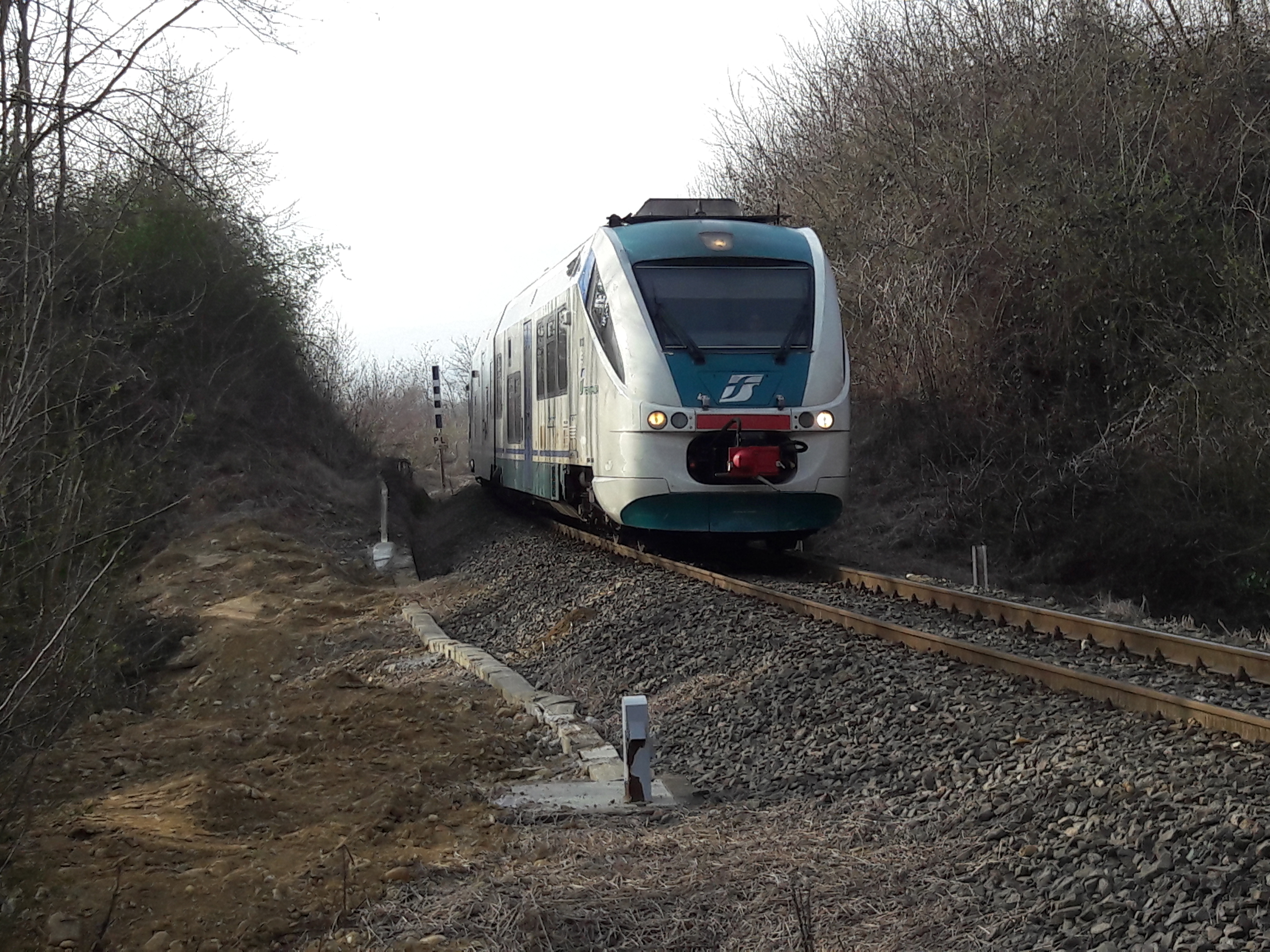 Reg. 4821 in corsa verso Novara nel tratto della frazione Battiana di Lessona.